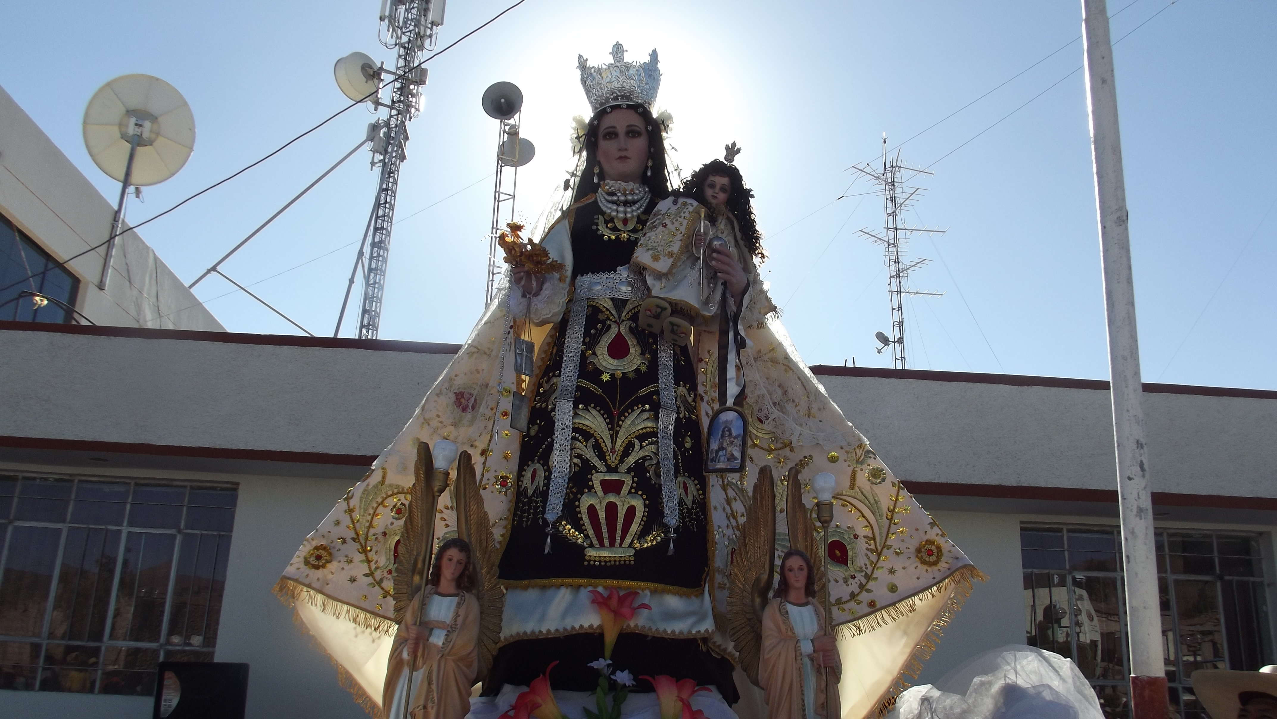 Nuestra patrona, en Andaray